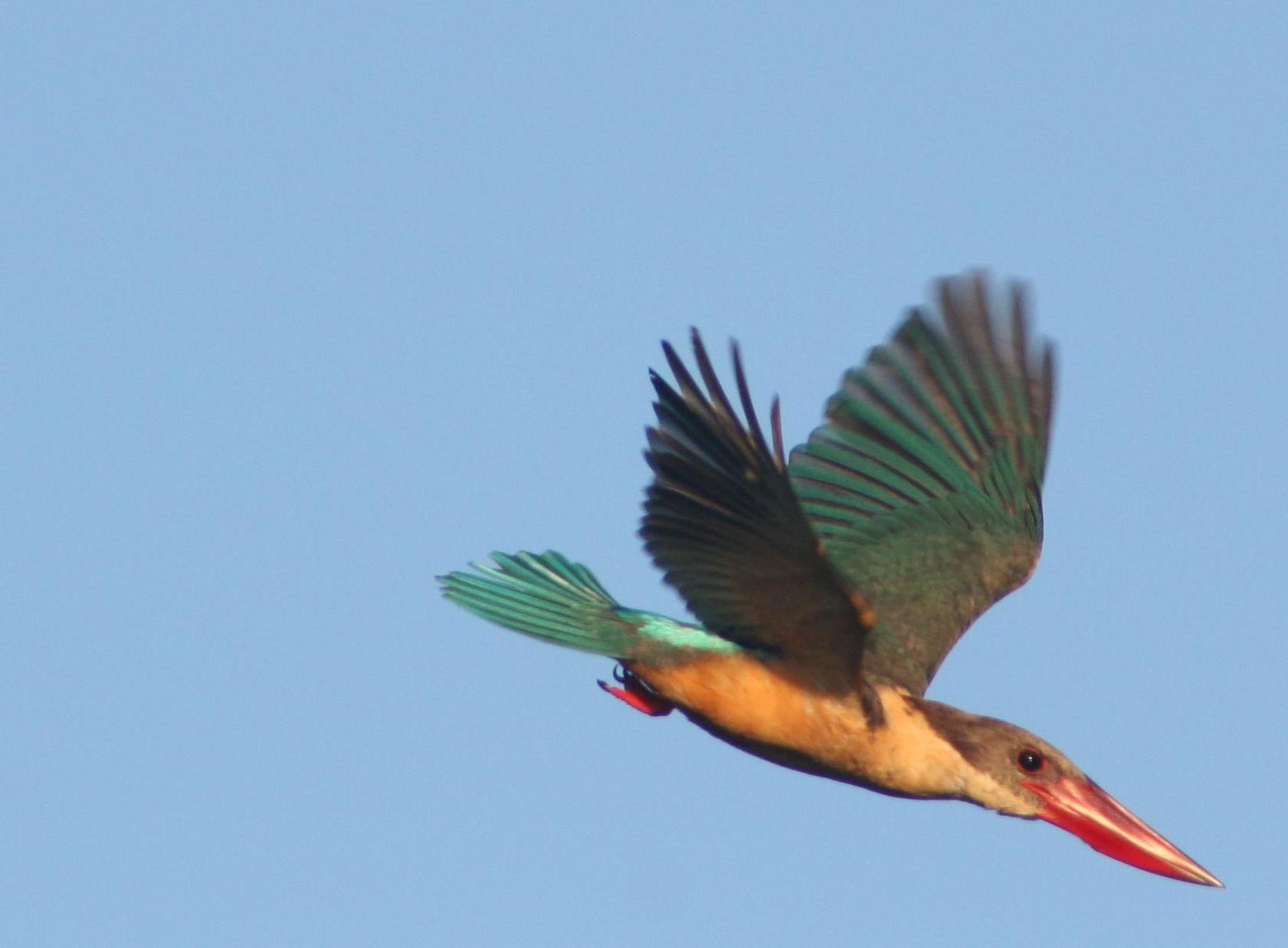 Stork-billed Kingfisher from Kumarakom in Kerala, India